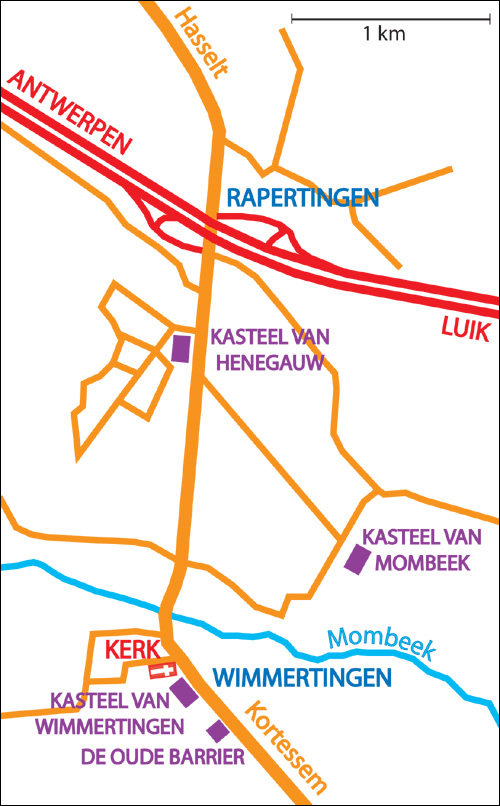 Kaartje Wimmertingen